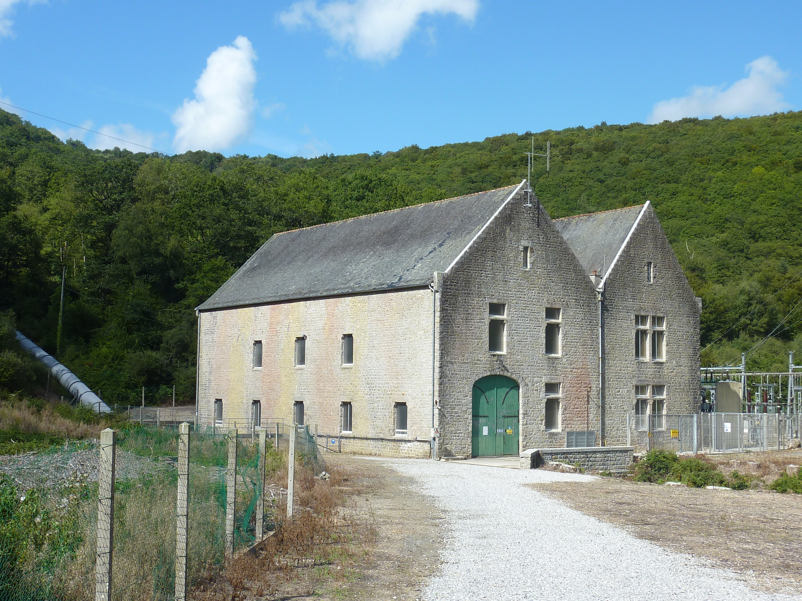 Saint-Herbot (Loqueffret): l'usine hydroélectrique, construite en 1922 par l'architecte Charles Chaussepied